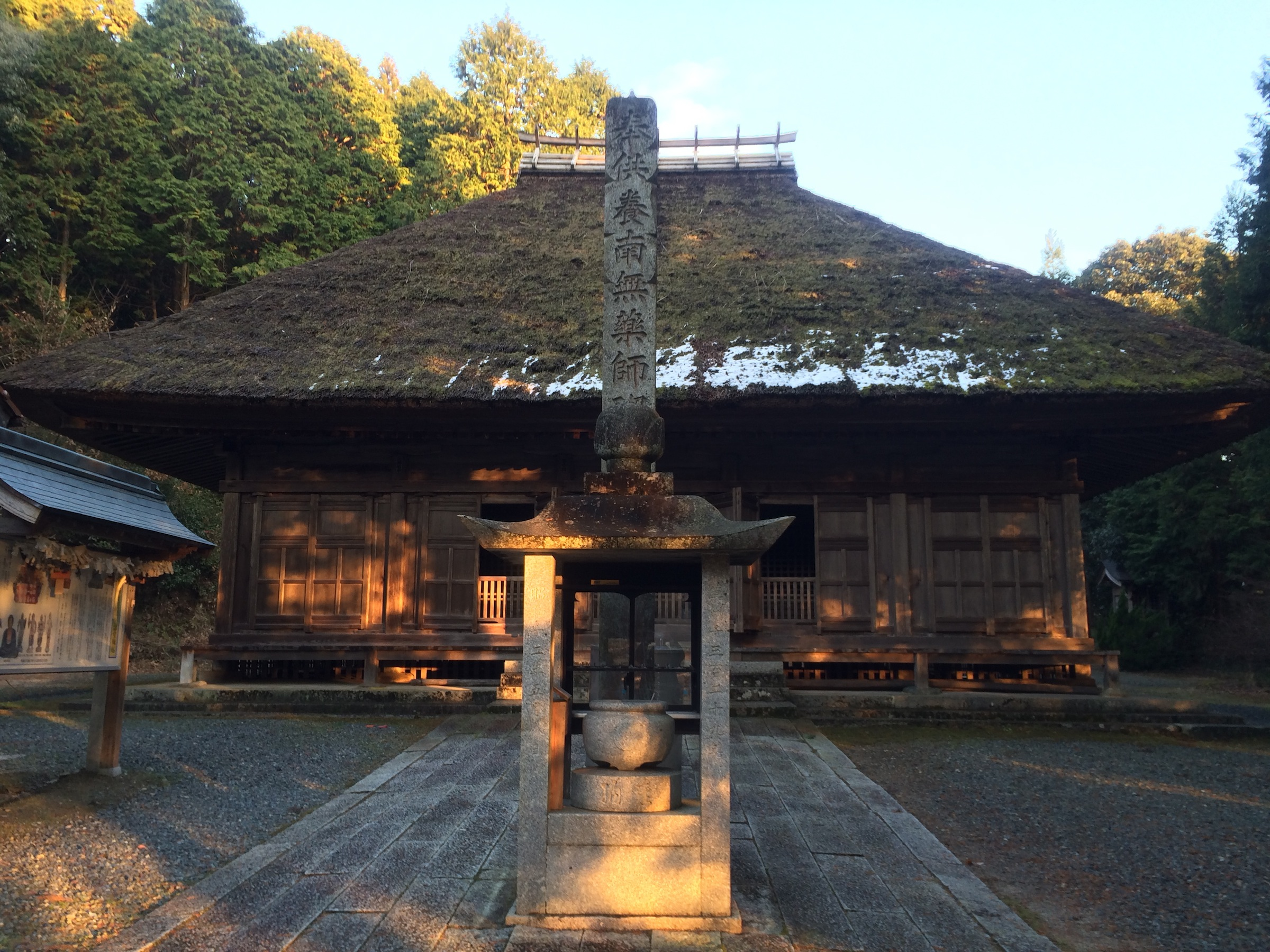 月輪寺の薬師本堂（山口市）